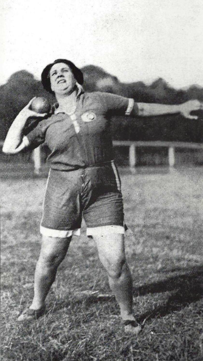 Violette Morris au lancer du poids (1920).